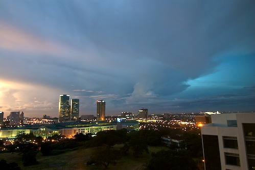 sunset over Alabang, Muntinlupa